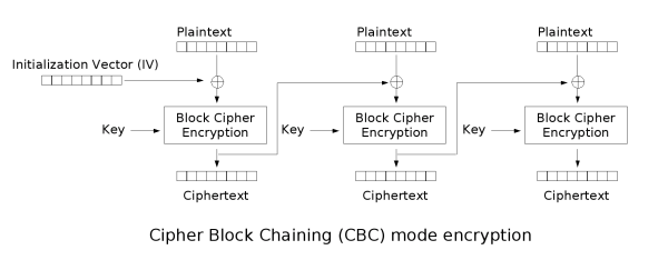 Cifrado CBC